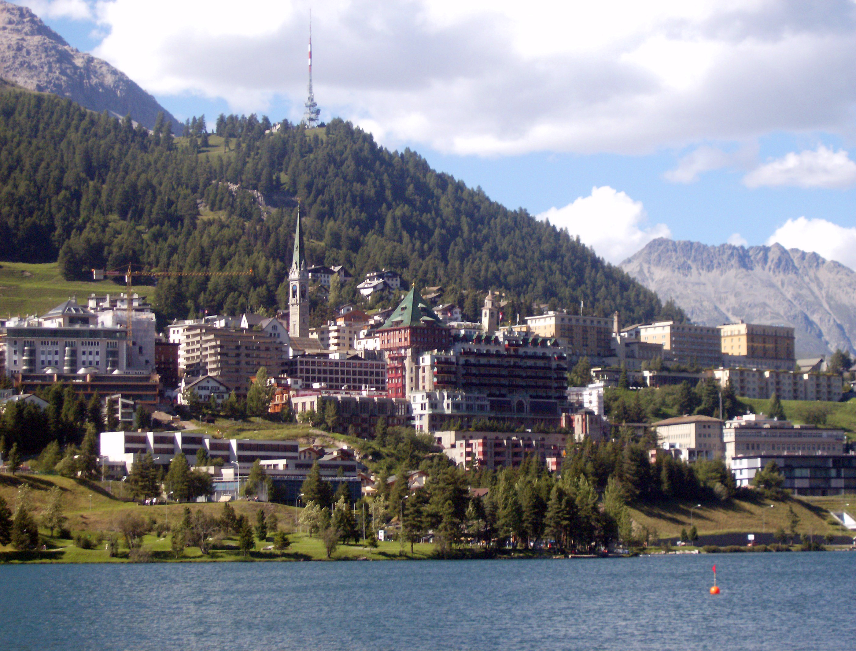 Sankt Moritz